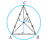 Նկար 2